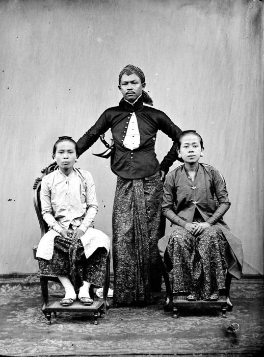 Negatief. Portret van de regent van Banjoemas met vrouwen